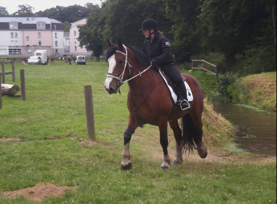 Antic lors de la qualification loisir montée primée par l'IFCE et organisée au Haras de Lamballe